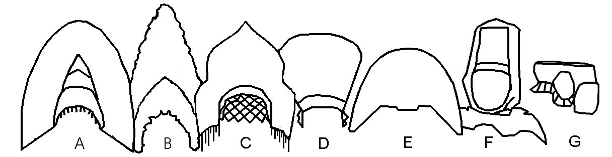 Кокошники, слева направо: A – двухрогий кокошник Арзамасского уезда Нижегородской губернии; B – однорогий кокошник, Костромская губерния; C – русский кокошник; D - кокошник, Московская губерния, Е - кокошник, Владимирская губерния, F - кокошник в виде цилиндрической шапки с плоским дном (с платком) G - Двухгребенчатый, или седлообразный, кокошник (вид в профиль)